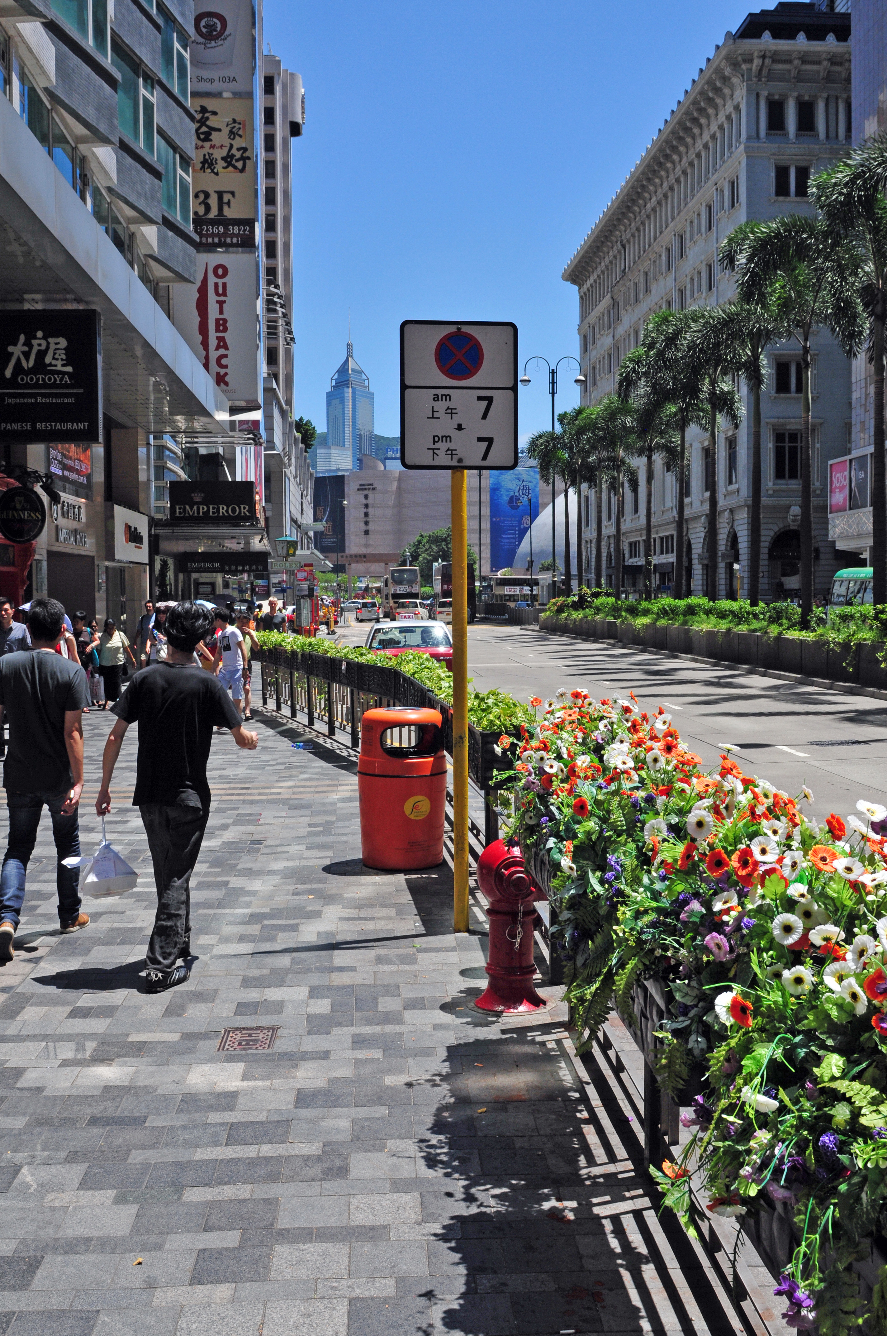 Wikimania 2013 Hongkong